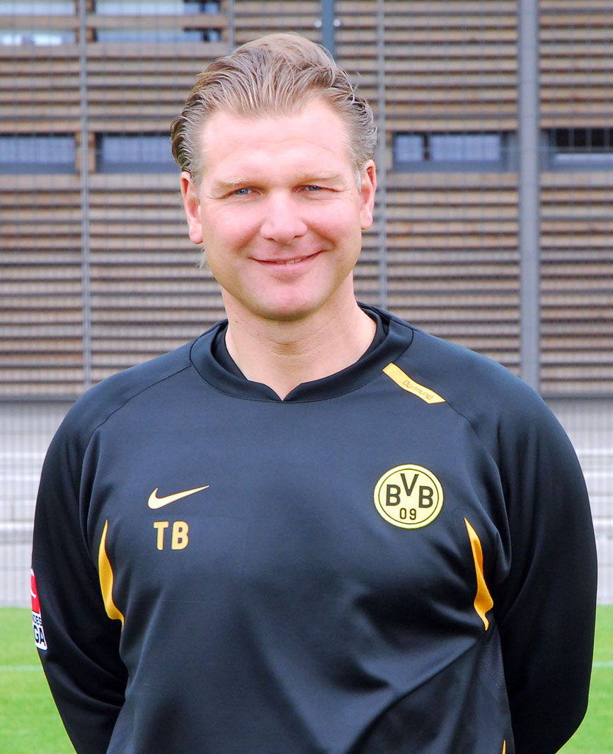 Wolfgang De Beer bei der Mannschaftsvorstellung